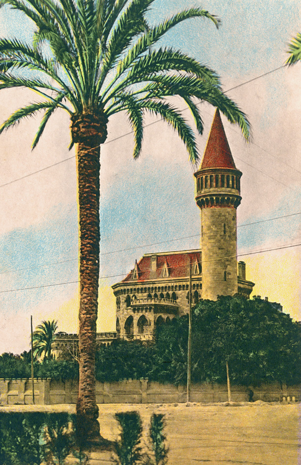 Palacio de Ripalda, Valencia, Spain.